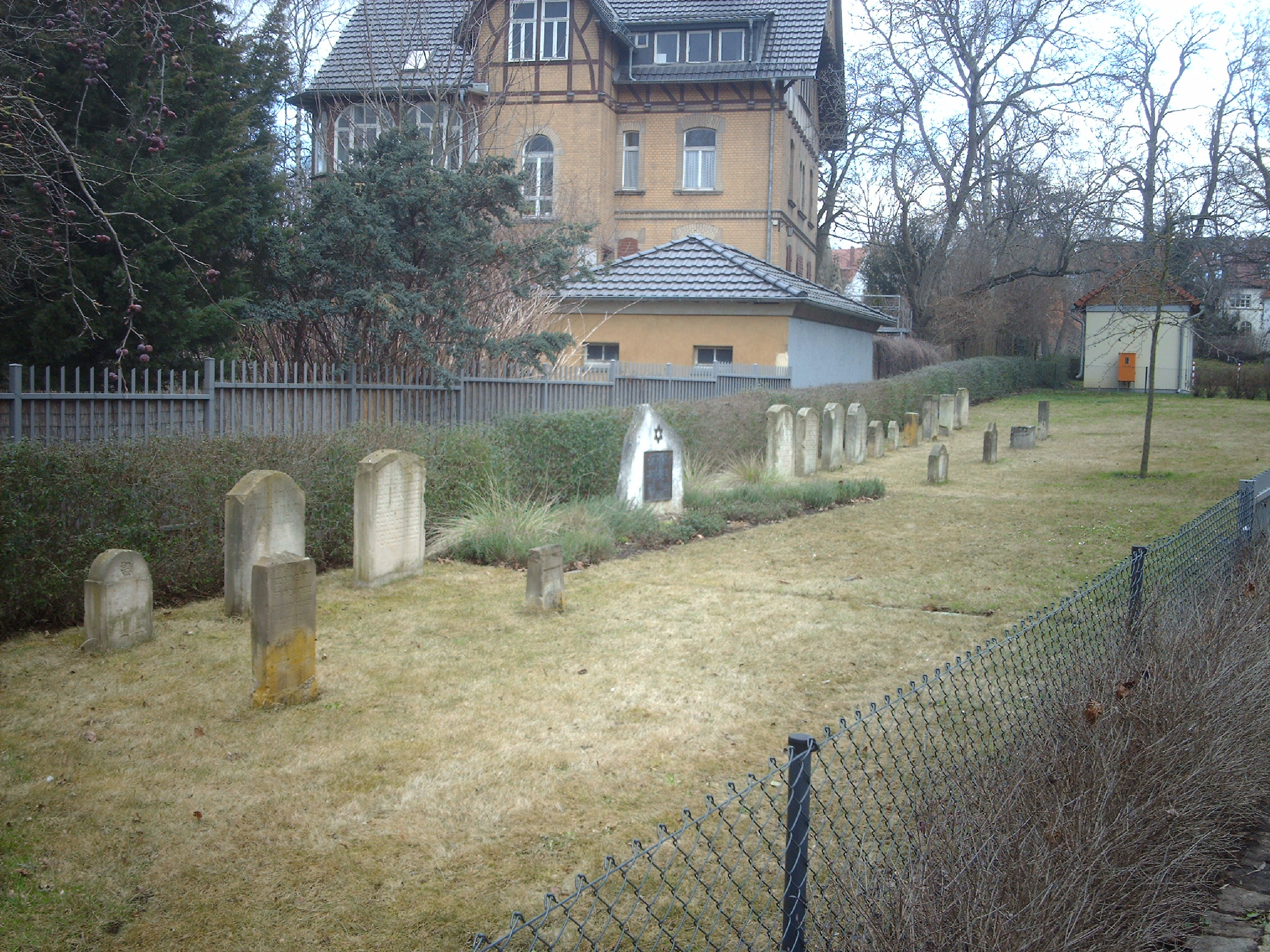 Alter jüdischer Friedhof in Erfurt, Cyriakstraße.